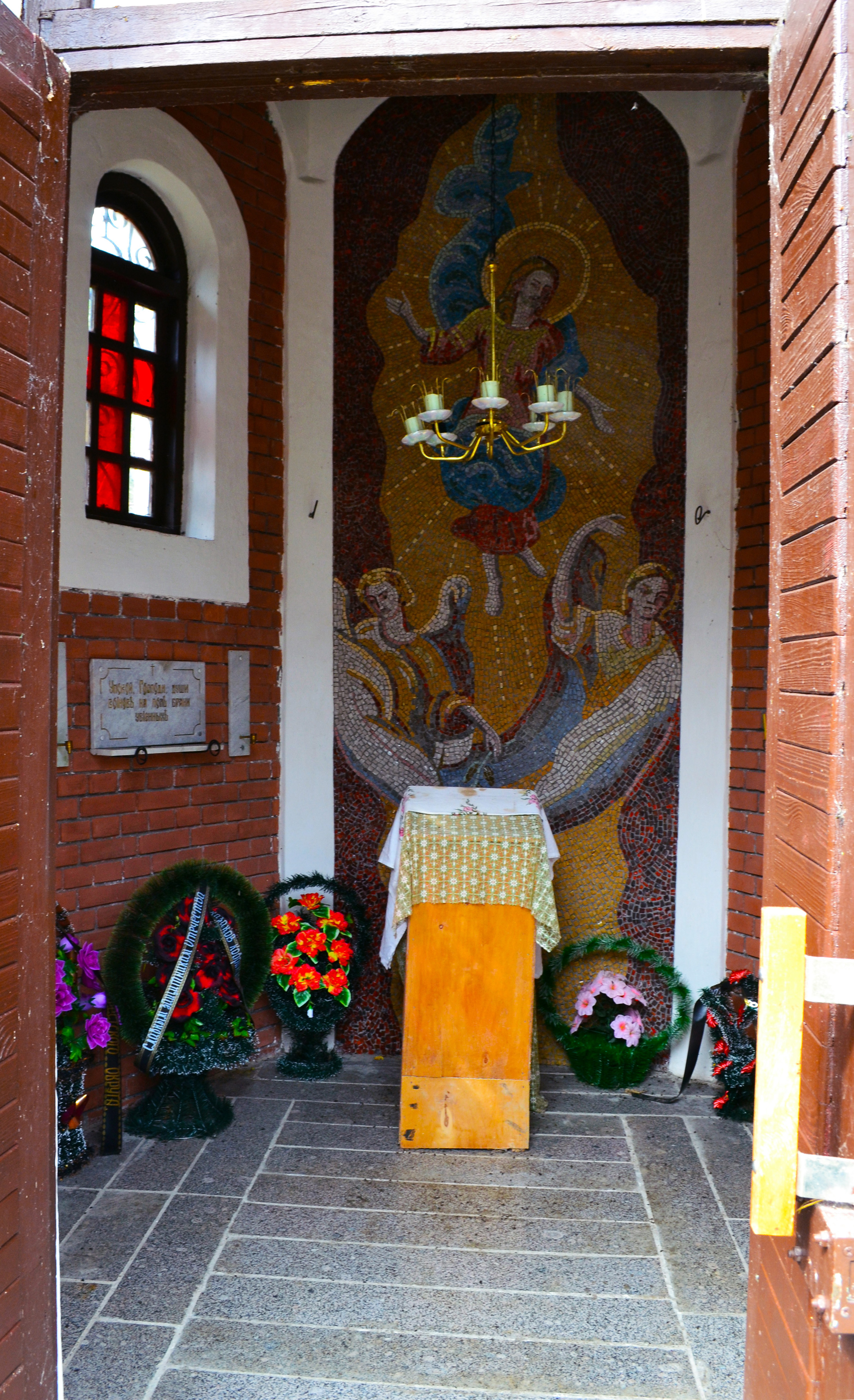 Беларуская (тарашкевіца): Капліца на месцы бітвы 1812 году. В. Паддубна This is a photo of Belarusian heritage monument. Reference number: 113Г000631 ( WLM)